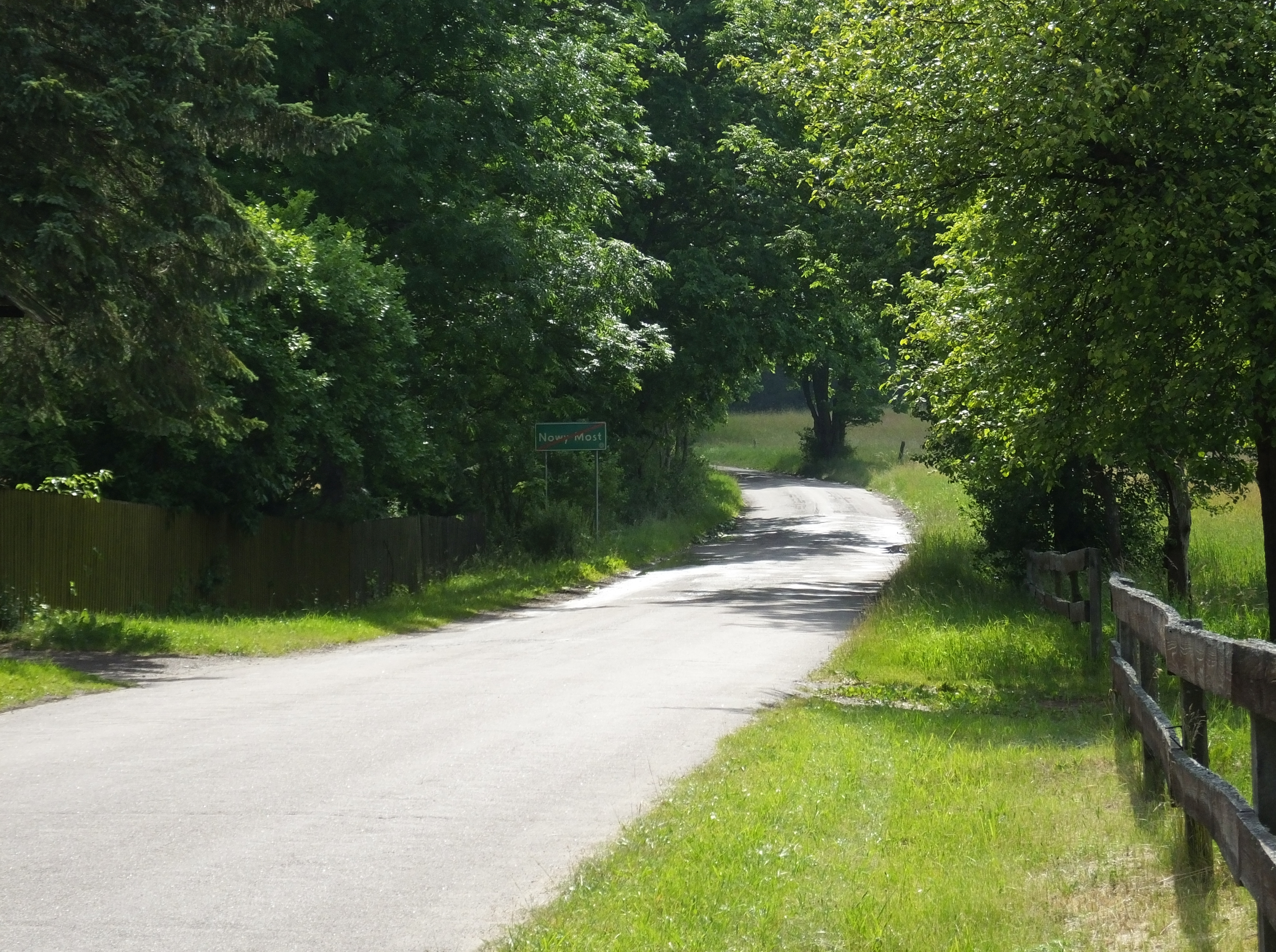 Nowy Most, część wsi Bobrówko k. Mikołajek